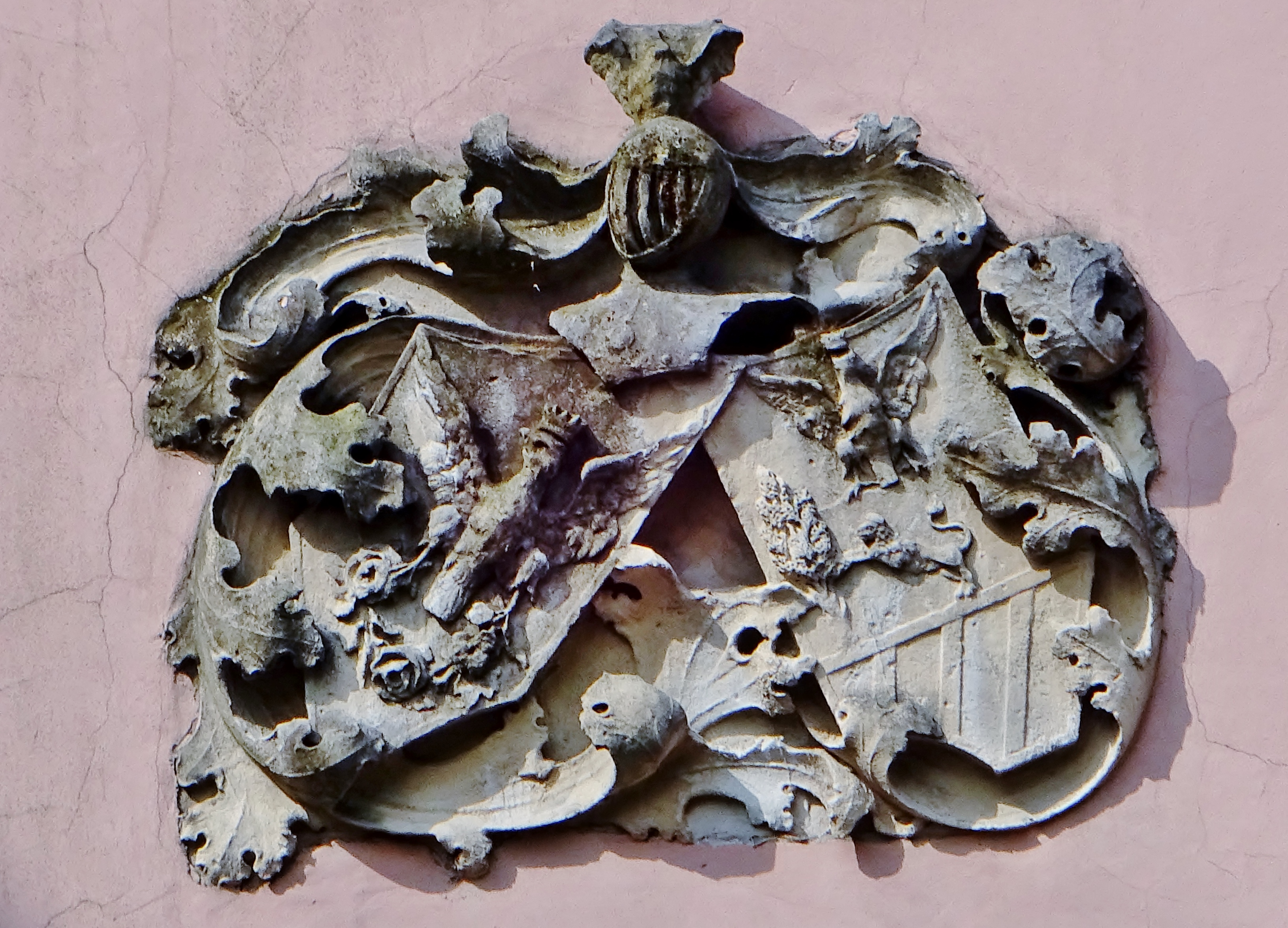 Villa Ghirlanda Silva (solo esterni) This is a photo of a monument which is part of cultural heritage of Italy.